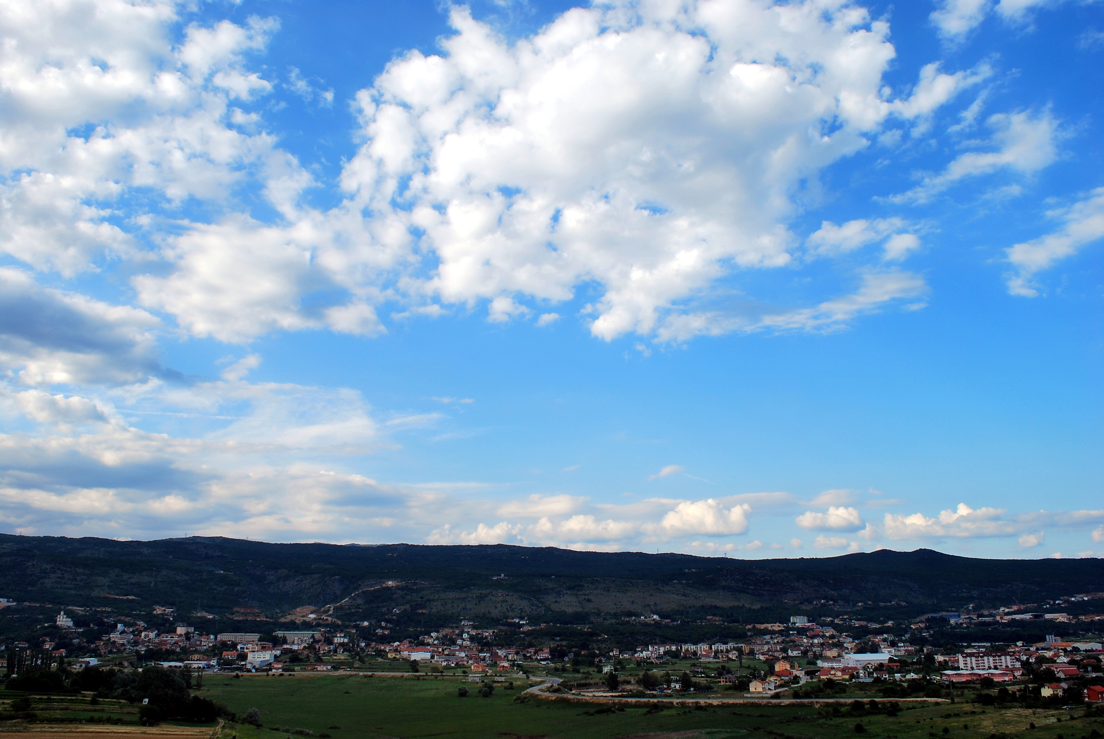 Panorama grada Grude